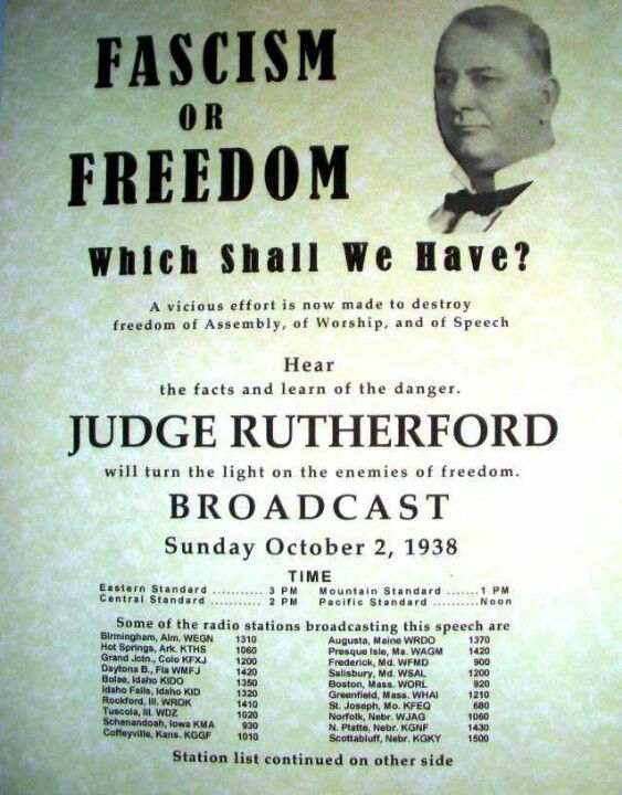 Zapowiedź przemówienia radiowego „Faszyzm czy wolność” wygłoszonego przez radio 2 października 1938 roku przez J.F. Rutherforda.